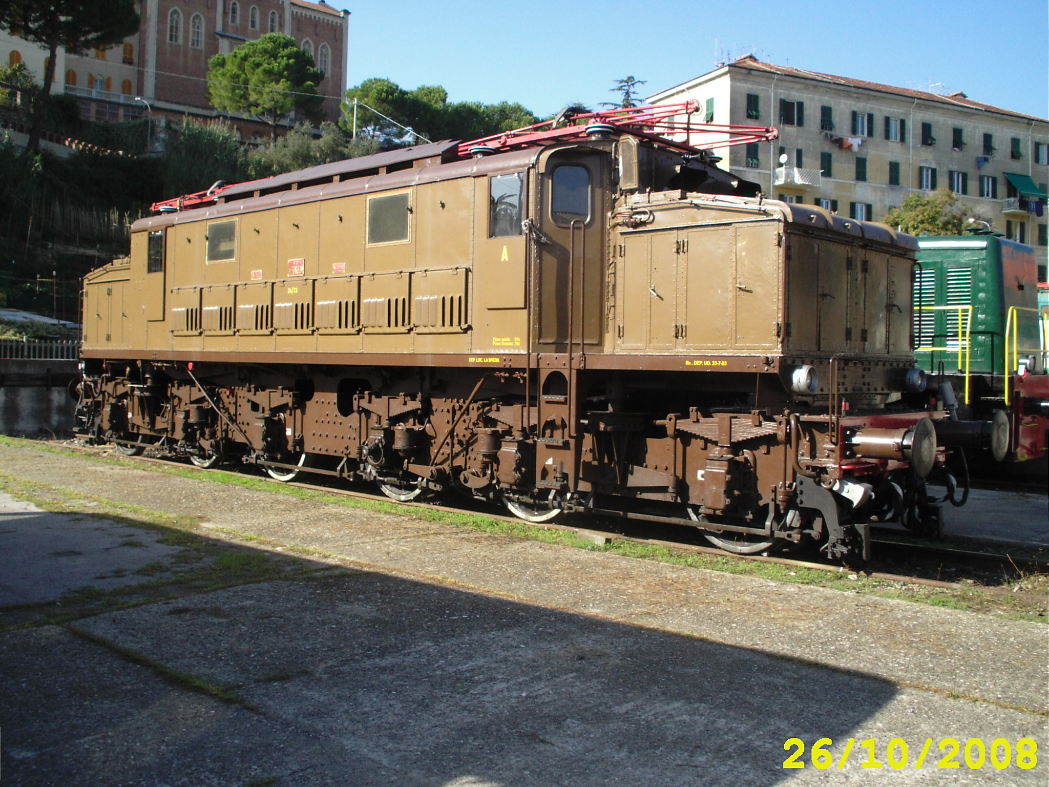 E626 294 La Spezia